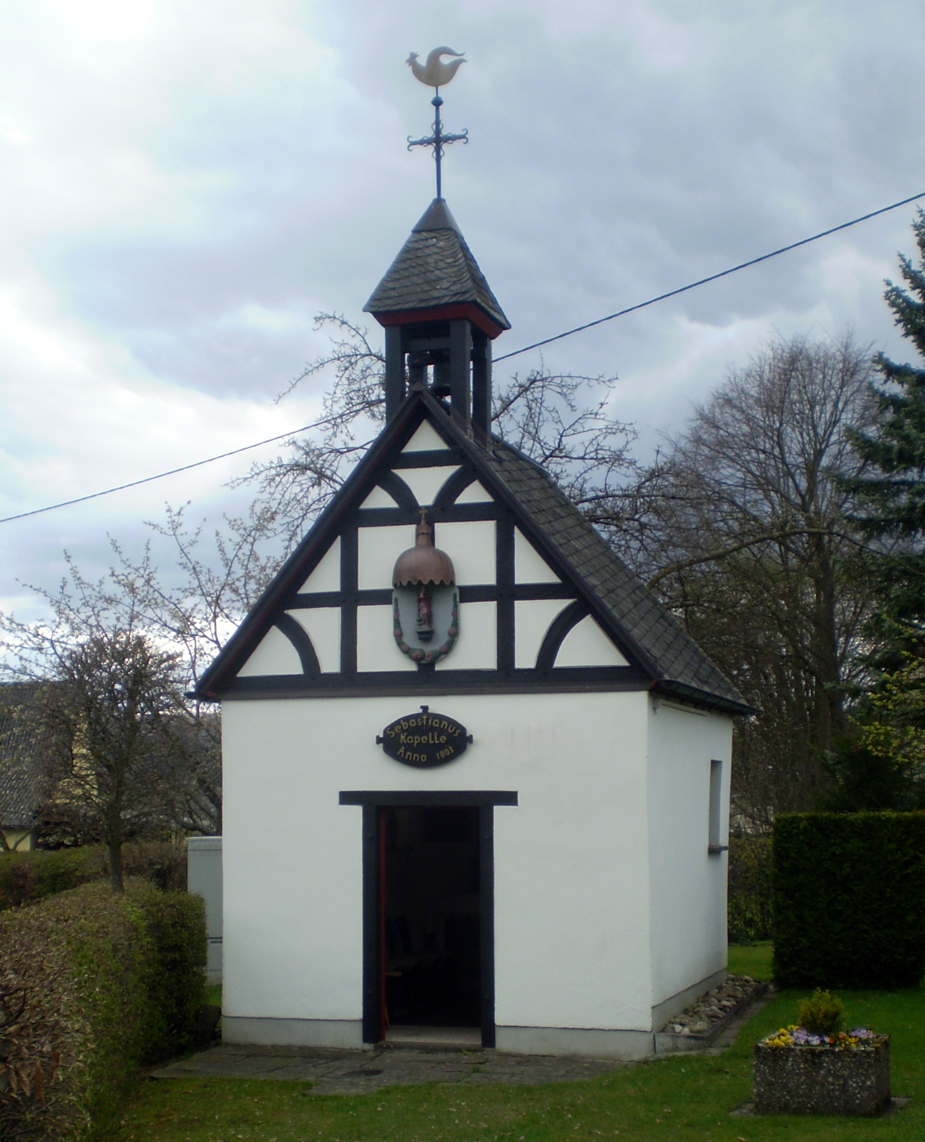 Katholische Kapelle St. Sebastian, Rederscheid